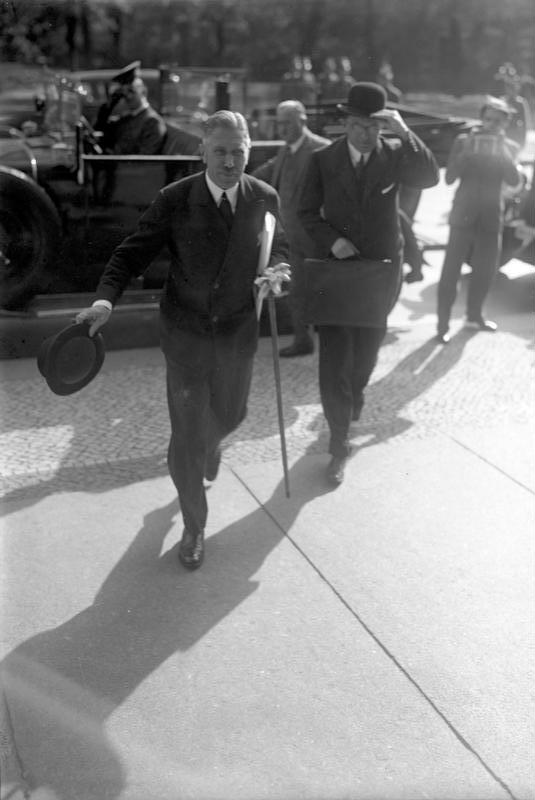 Die bedeutsame Reichstags-Sitzung am 12. September 1932 welche Reichskanzler von Papen durch ein Dekret des Reichspräsidenten auflöste! Reichskanzler von Papen begibt sich zu der bedeutsamen Sitzung in den Reichstag.